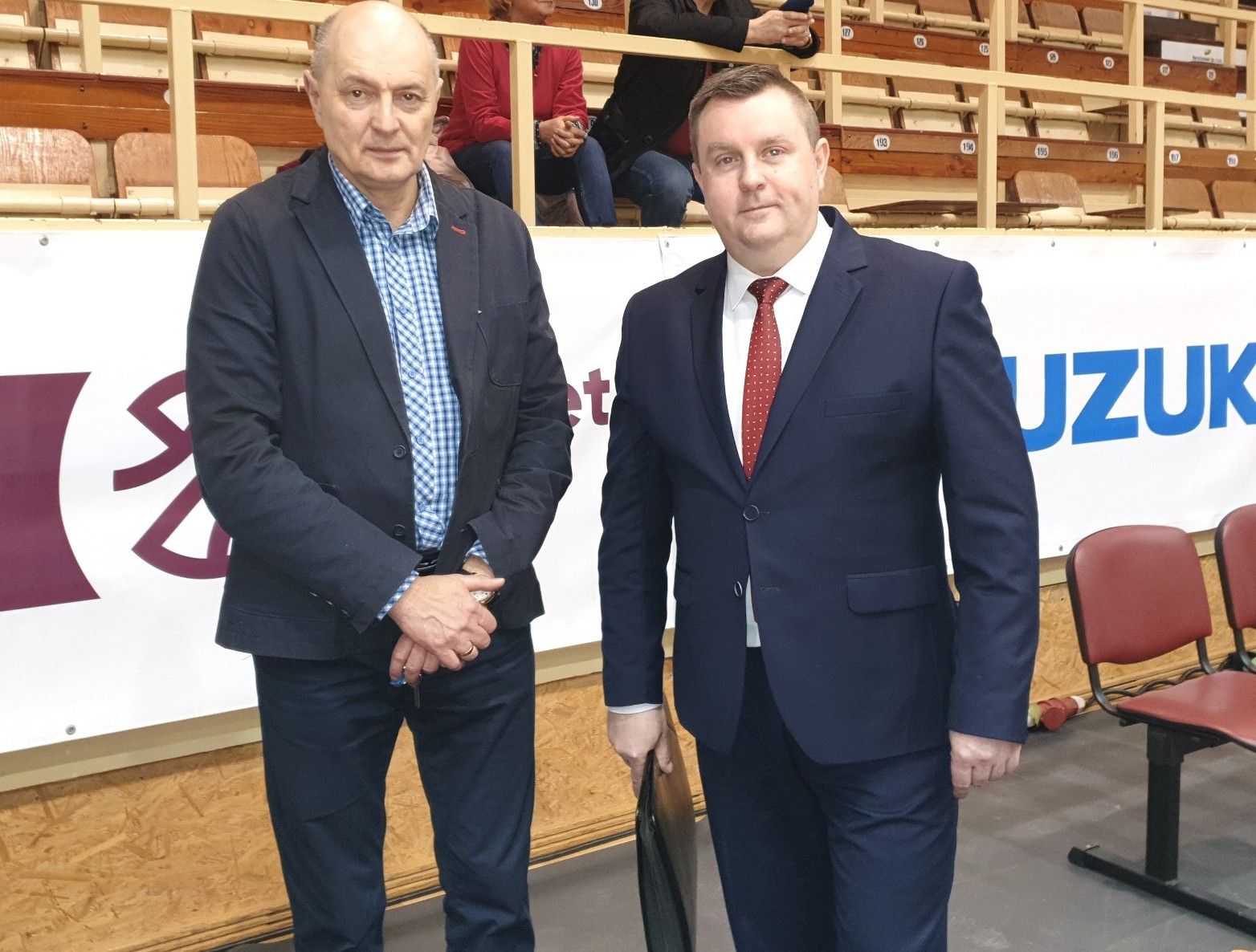 Tadeusz Gutowski z komisarzem zawodów (02.03.2019)